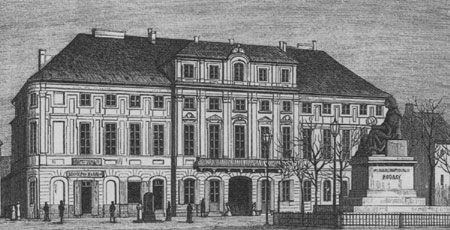 Karaś Palace in Warsaw